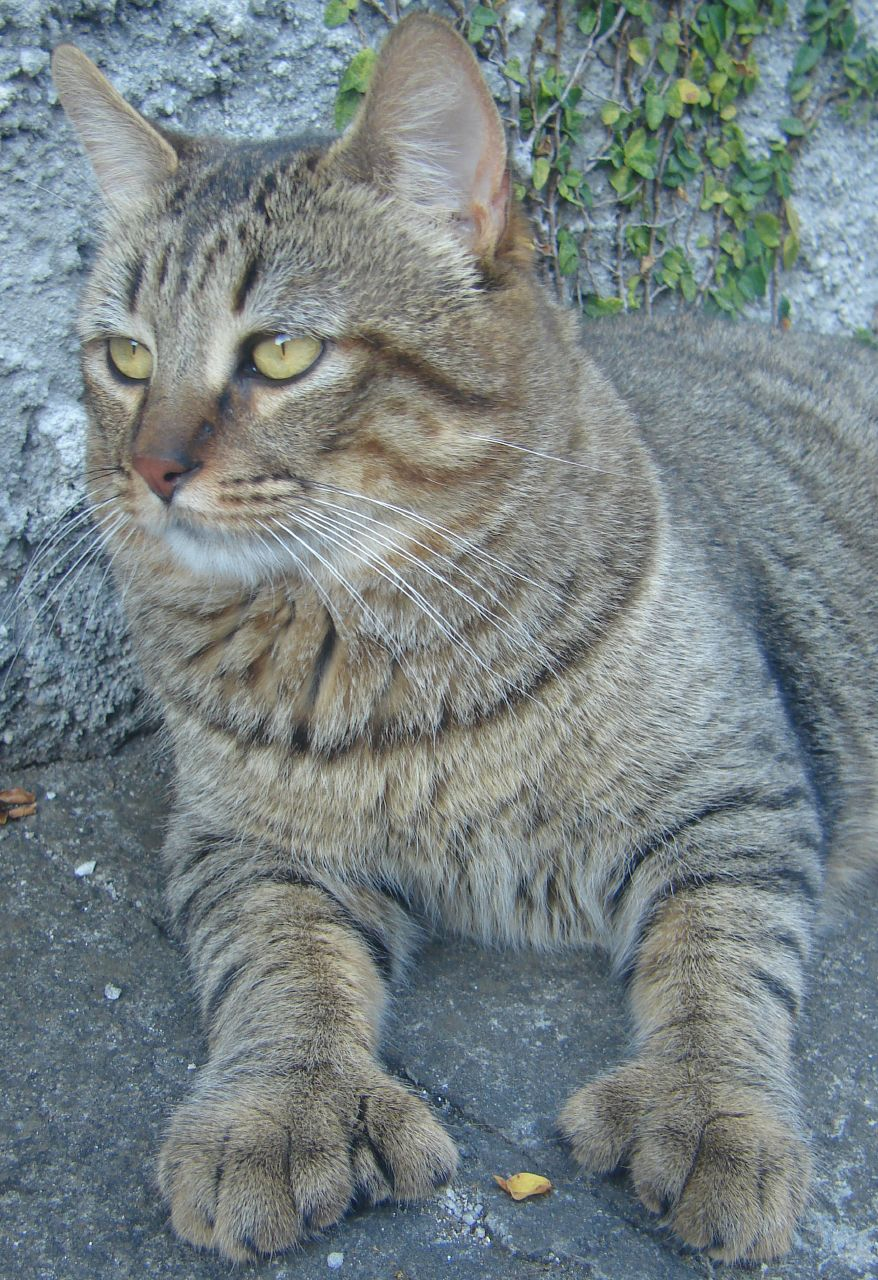 Pantanal